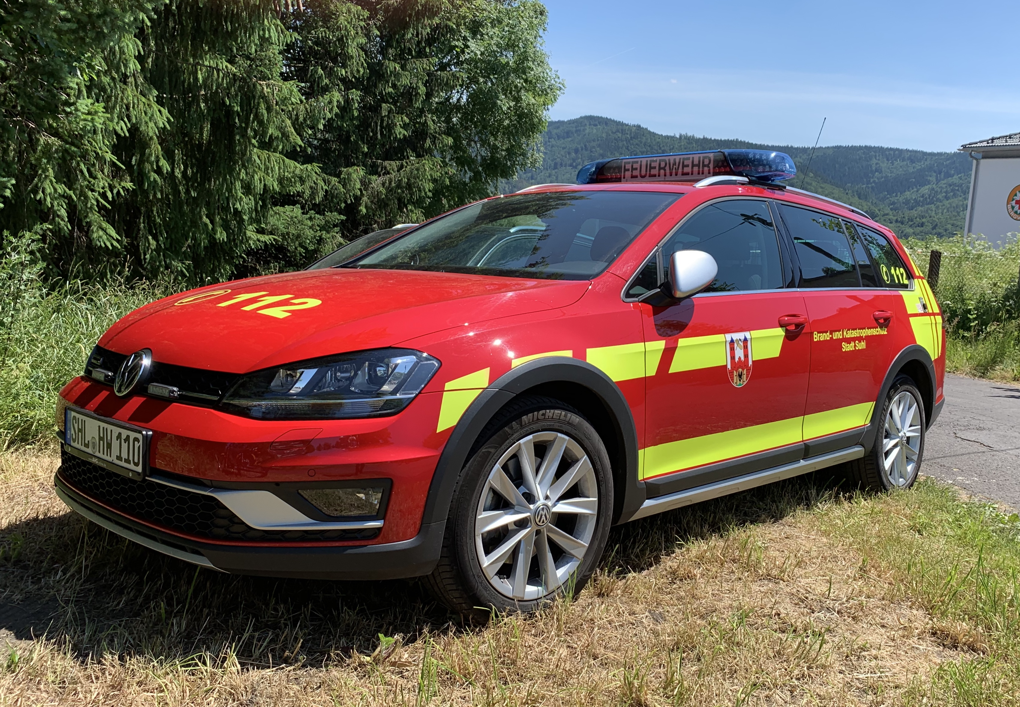 Kommandowagen 1 der Feuerwehr Suhl